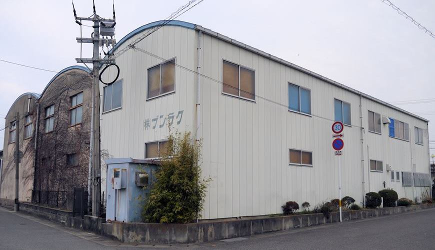 ブンラク鳴門工場